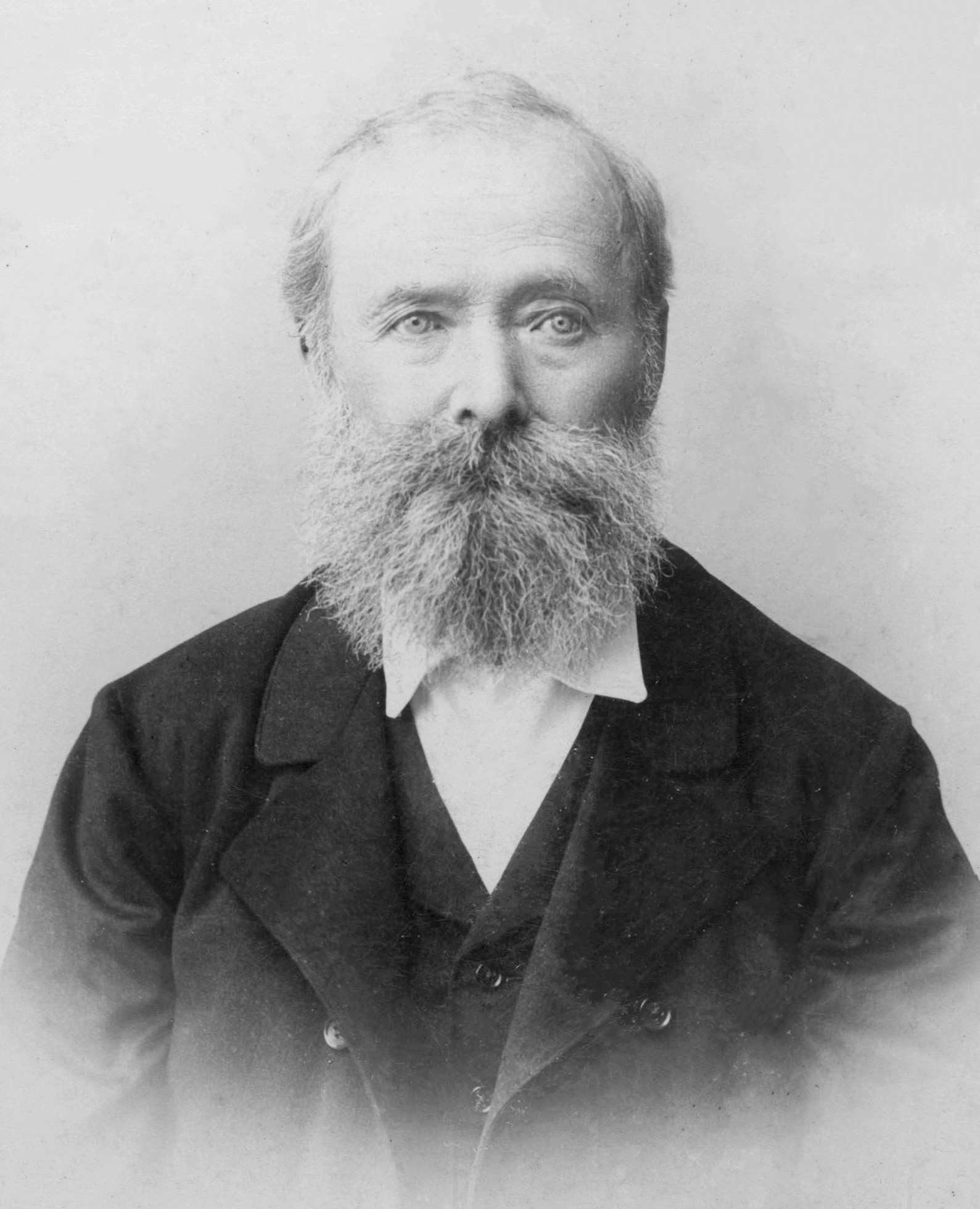 Svetozar Miletić